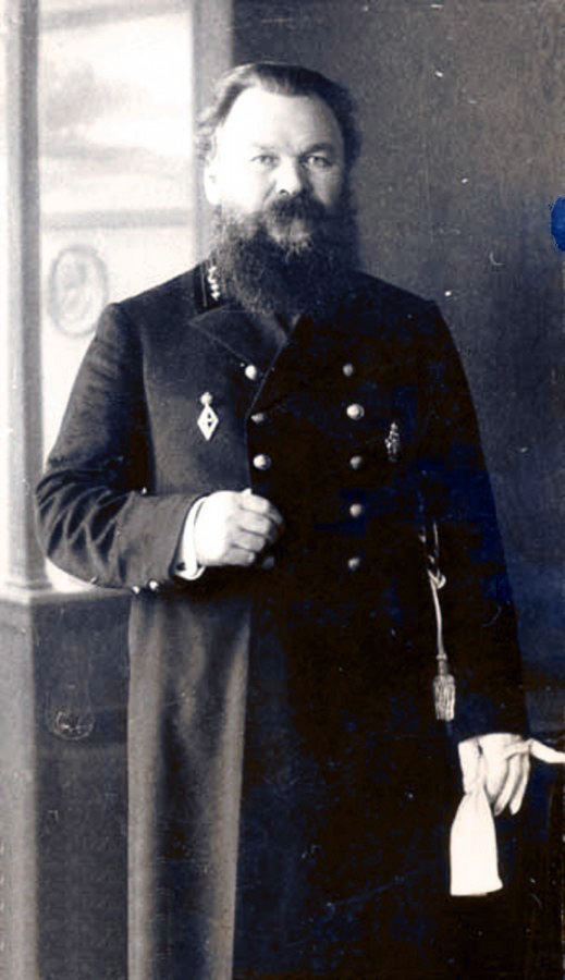 Мировой судья Константин Александрович Колокольников (1871—1929). Пермь, 1917 год.